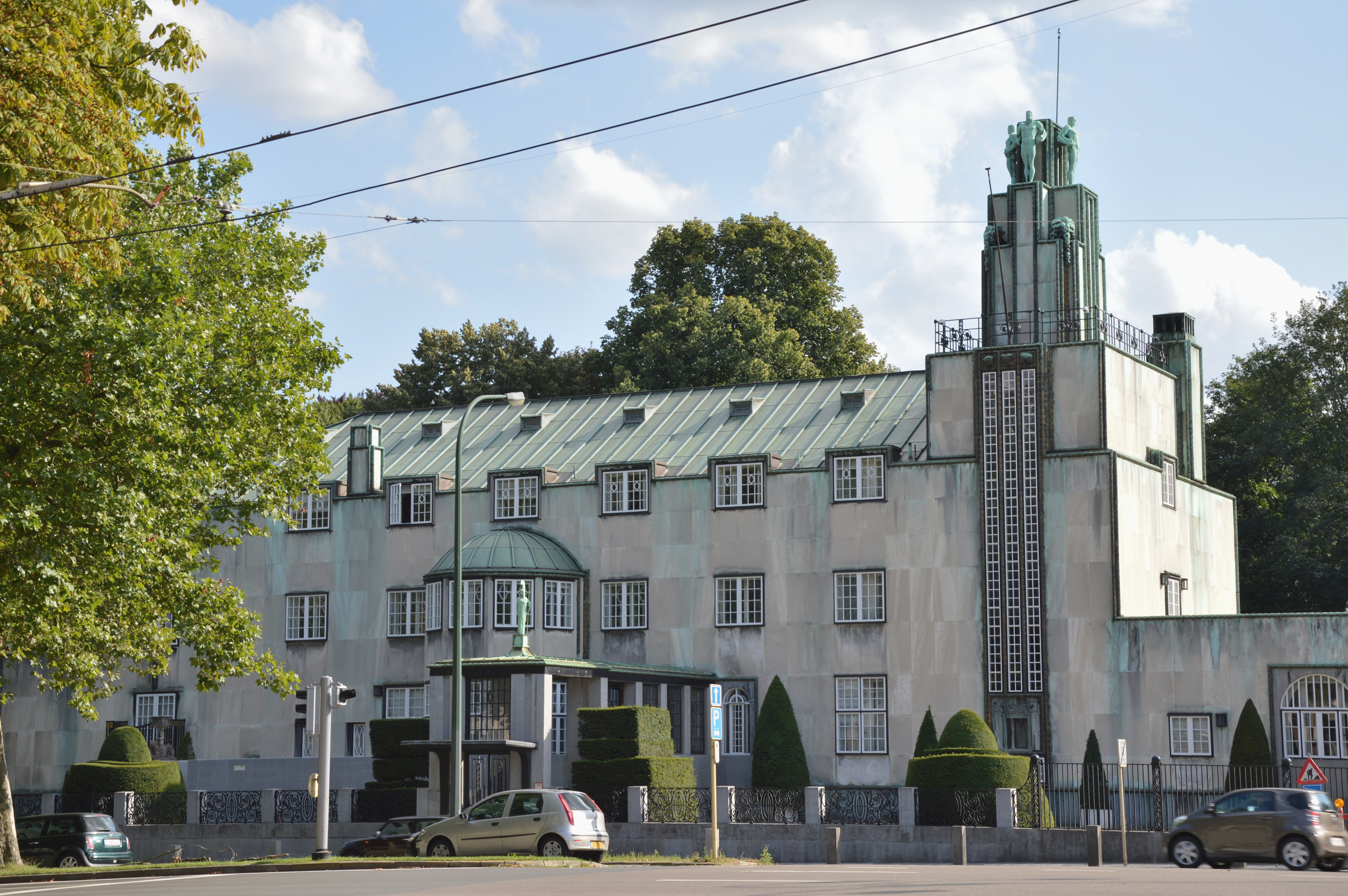 Palais Stoclet, avenue de Tervuren, n° 279/281 à Woluwé-Saint-Pierre.